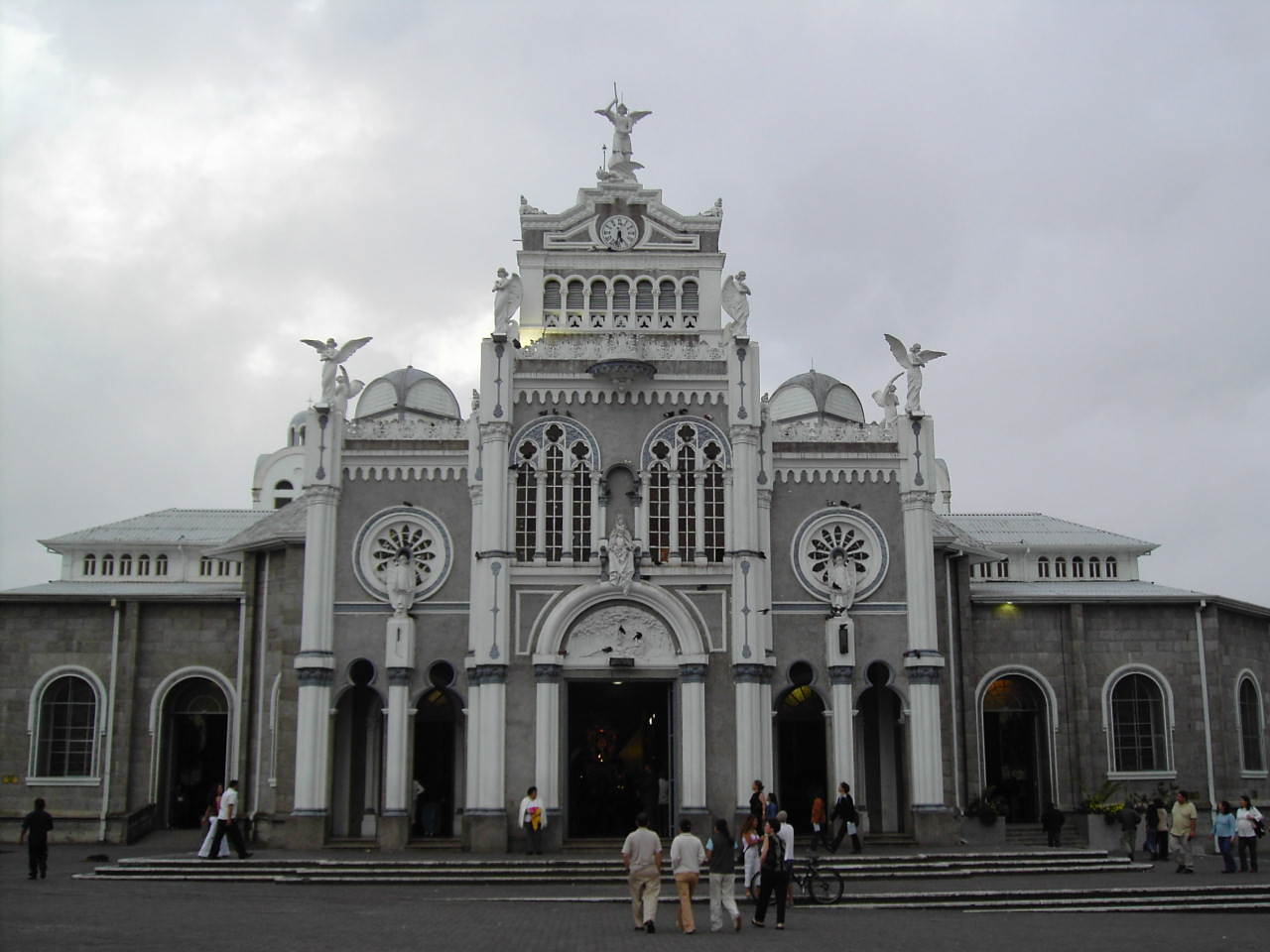 De Onze Lieve Vrouw van Los Angeles Kathedraal in Cartago, Costa Rica.